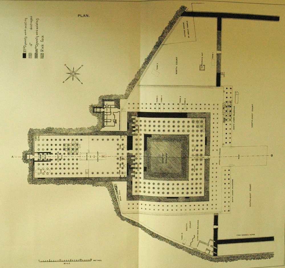 Plan des Totentempel des Mentuhotep II. in Deir el-Bahari, von Edouard Naville angefertigt